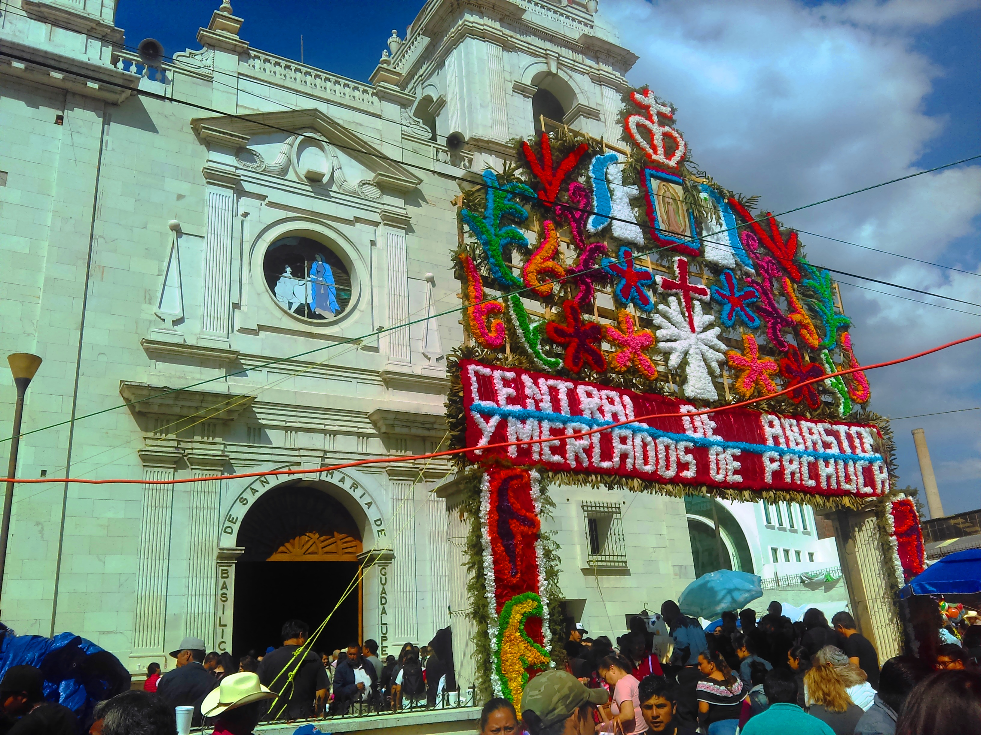 Basílica Menor de Nuestra Señora de Guadalupe el 12 de diciembre de 2019.